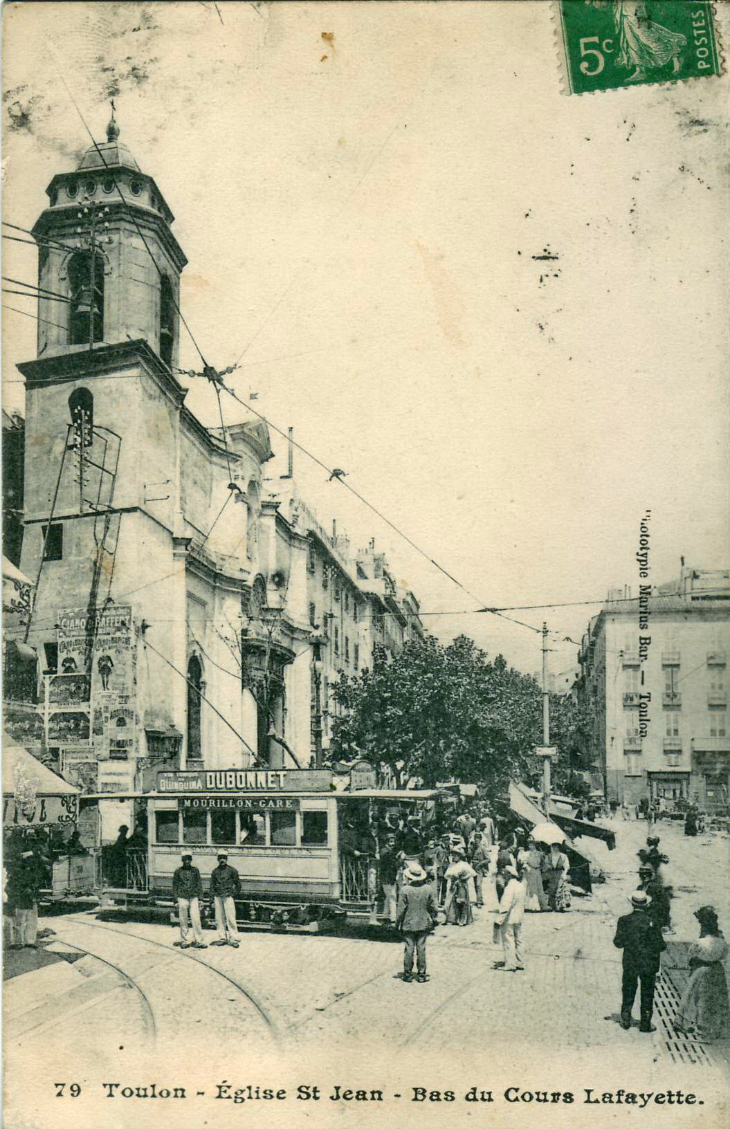 Carte postale ancienne sans mention d'éditeur, n°79 : TOULON - Eglise St Jean - Bas du Cours Lafayette